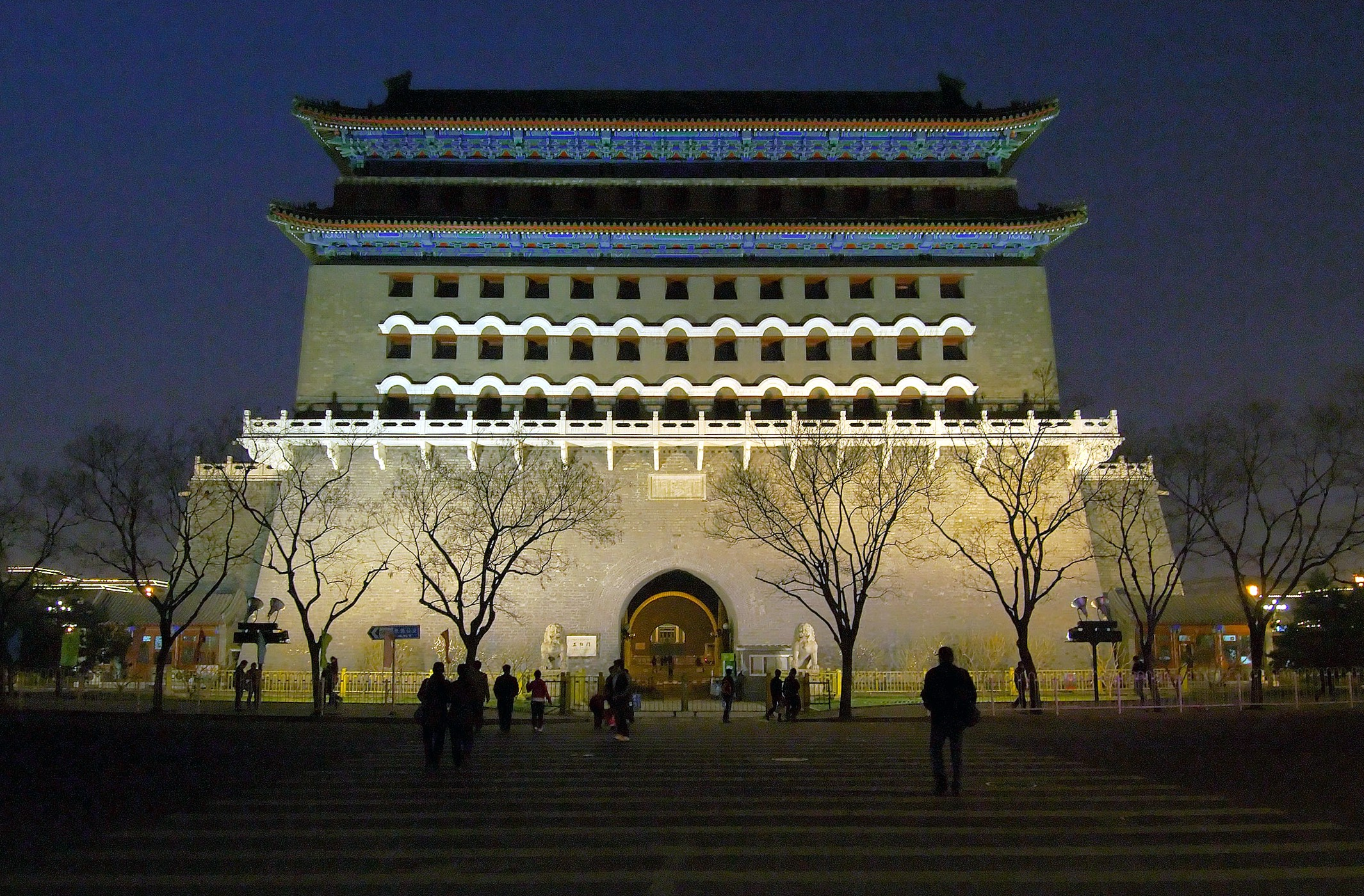 Qianmen (前門) in Beijing, China